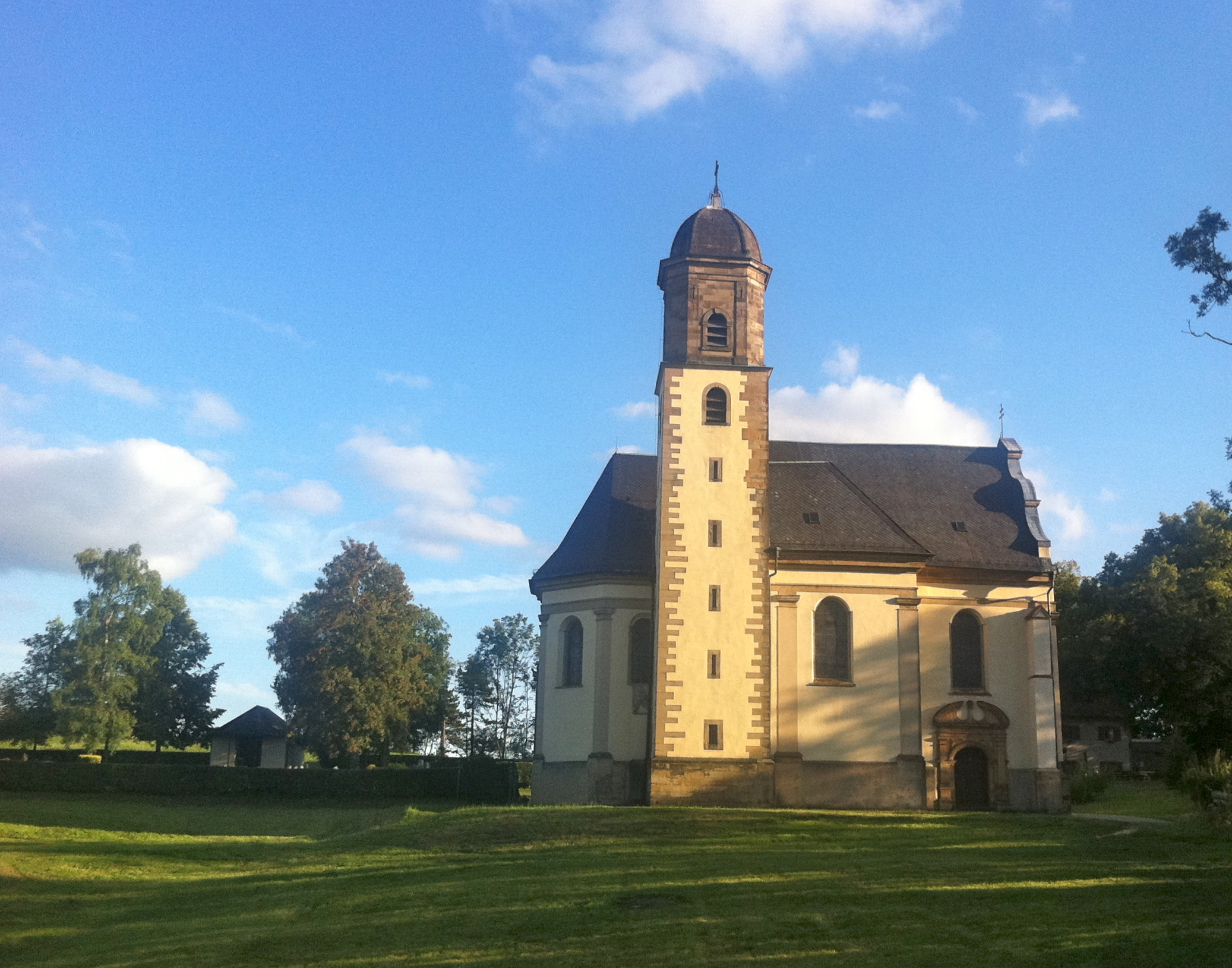 Wallfahrtskirche St. Maria (Hohenrechberg)